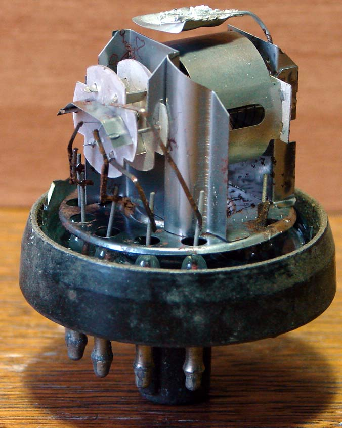 Röhre EBF11 aus RFT-Herstellung, Glaskolben geöffnet